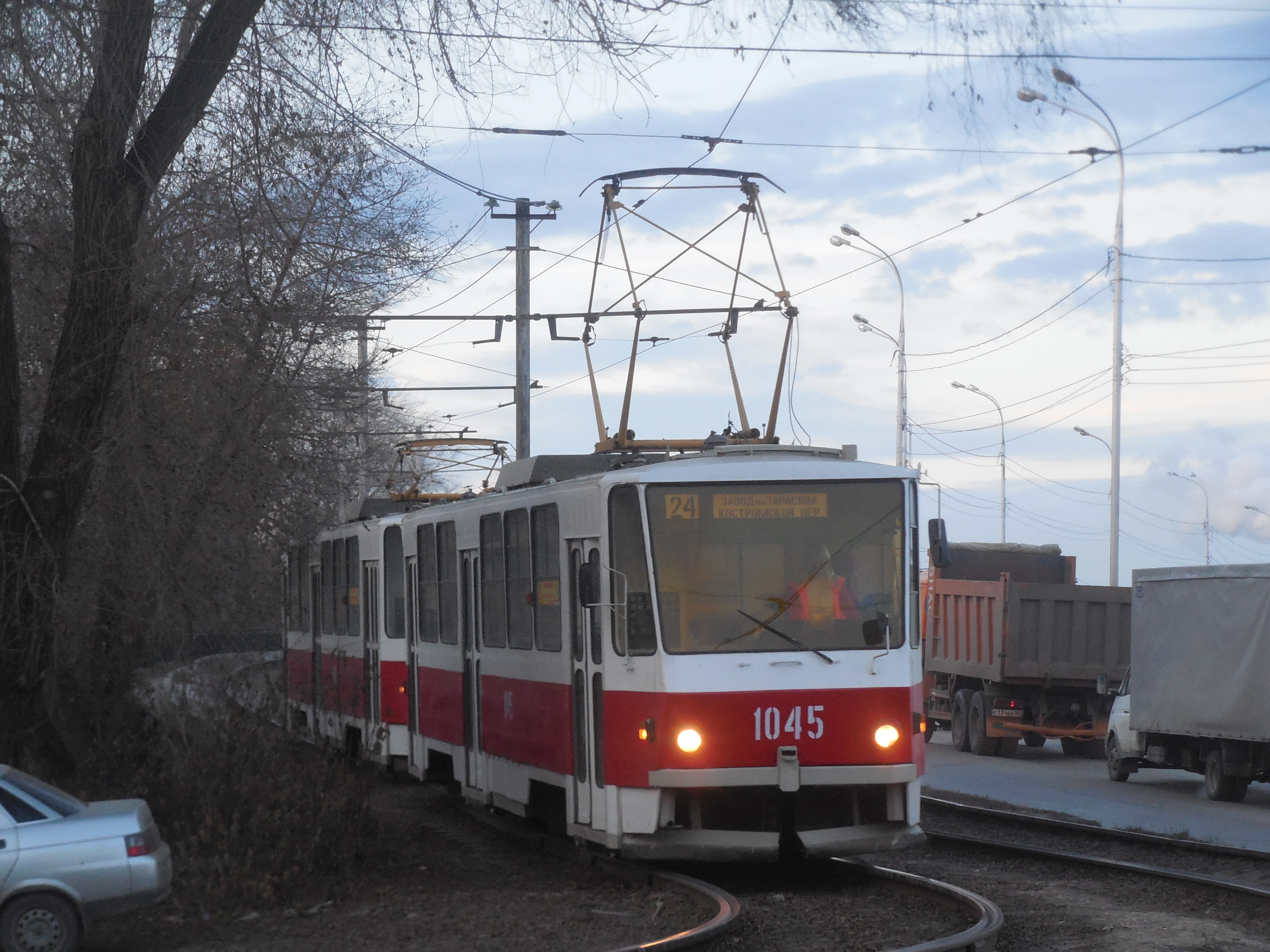 Samara tram Tatra T6B5SU 1045